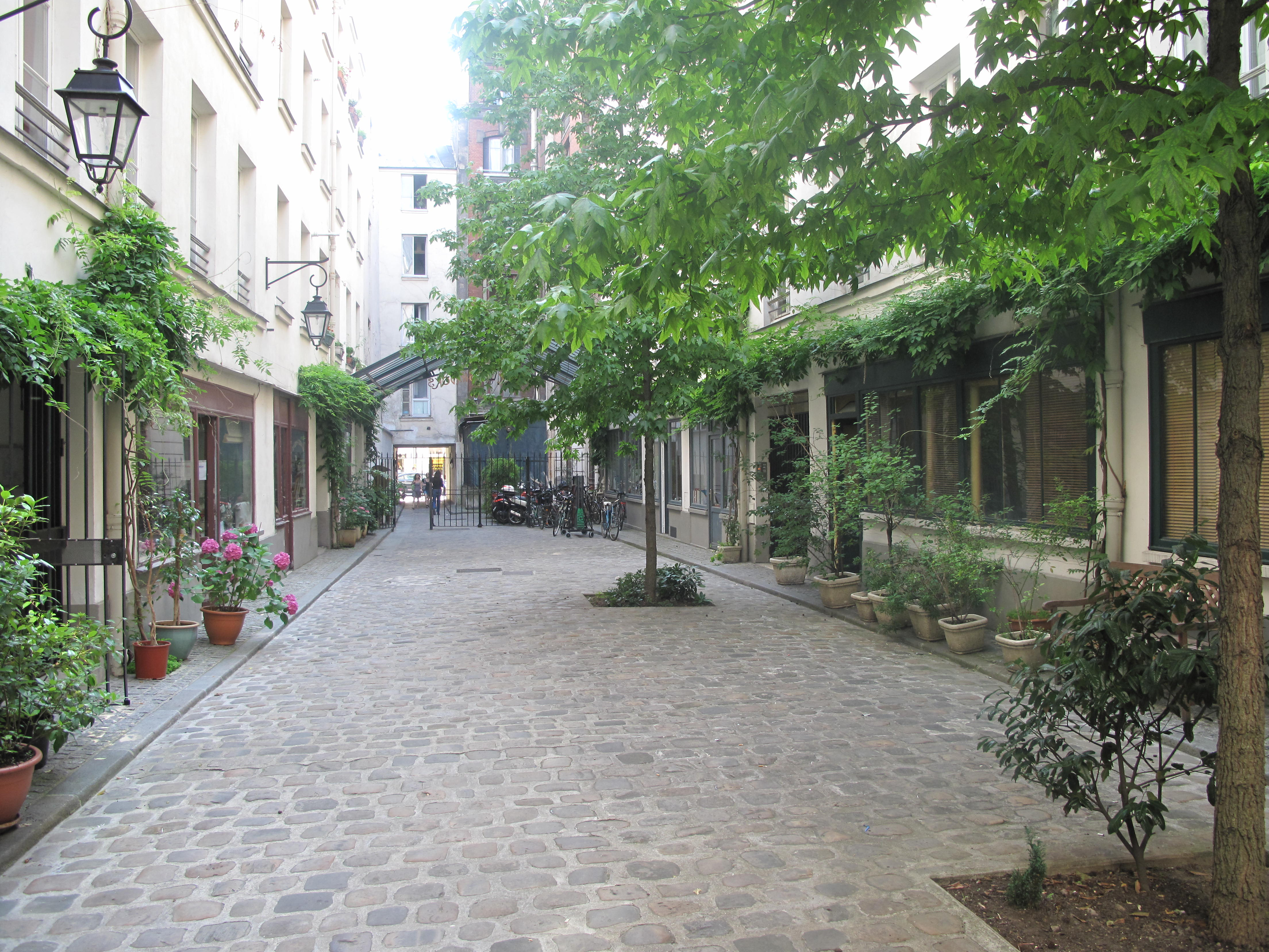 Cour au 71 faubourg Saint-Antoine, vue vers le sud, Paris 11e arr.